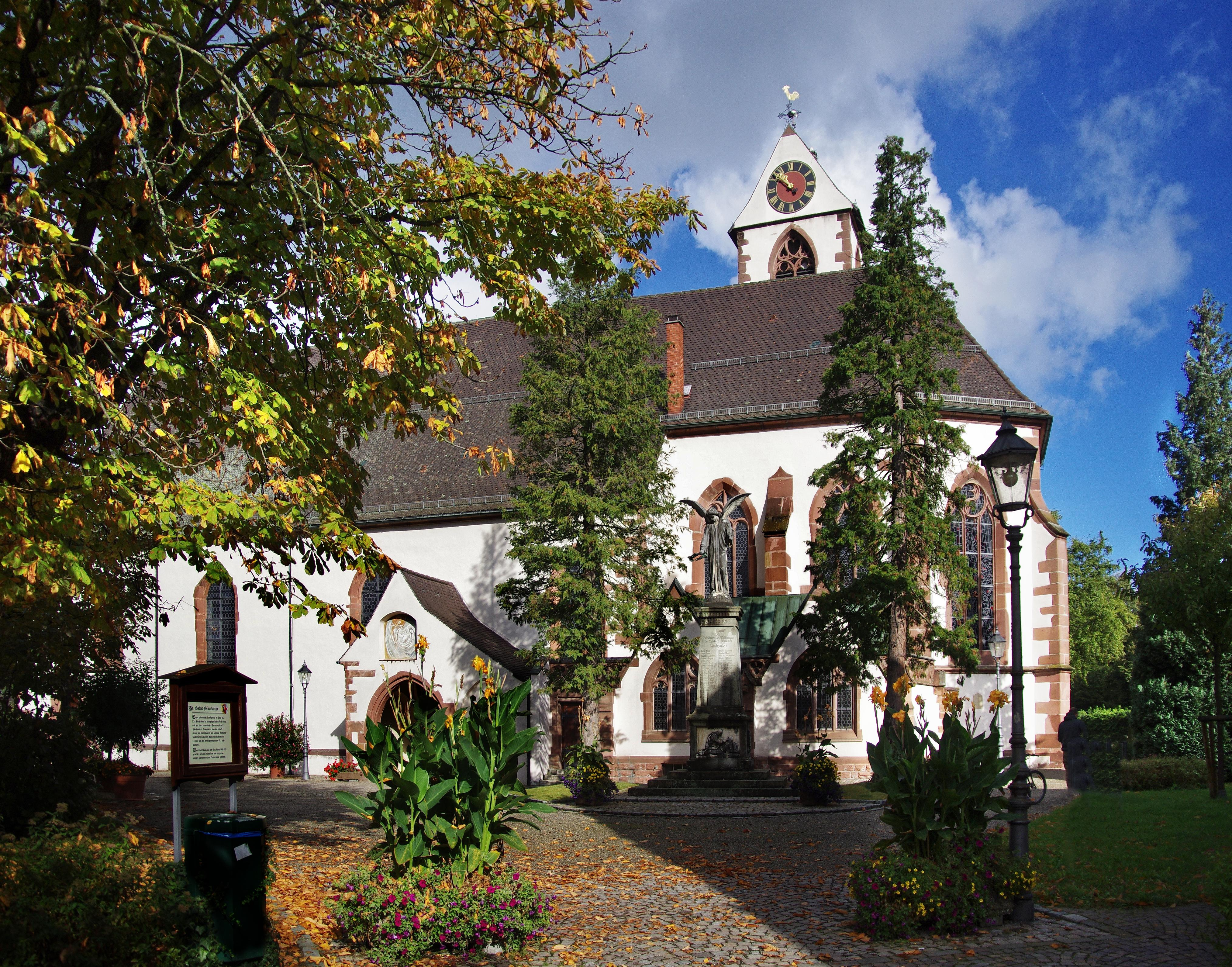 Blick von Süden auf die Kirche